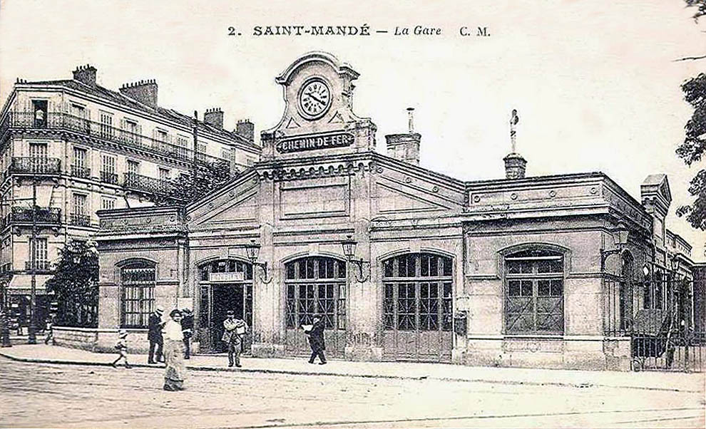 La gare de Saint-Mandé, Val-de-Marne, France.